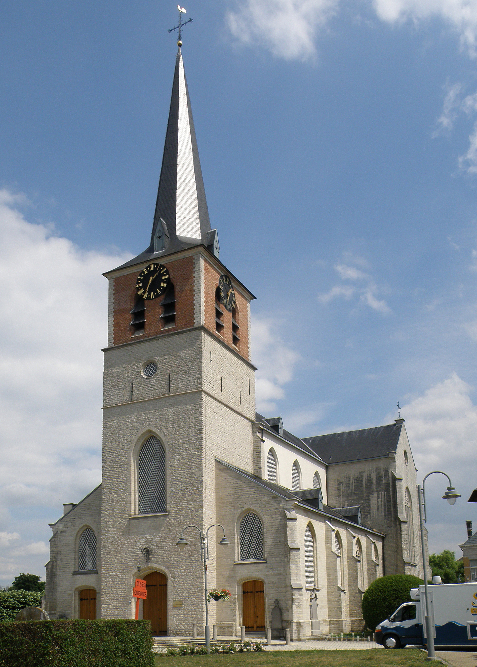 Ranst (prov. Antwerpen, België). Sint-Pancratiuskerk.